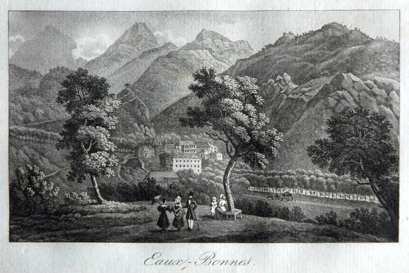 Vue des Eaux-Bonnes, gravure de AM Perrot, 1834